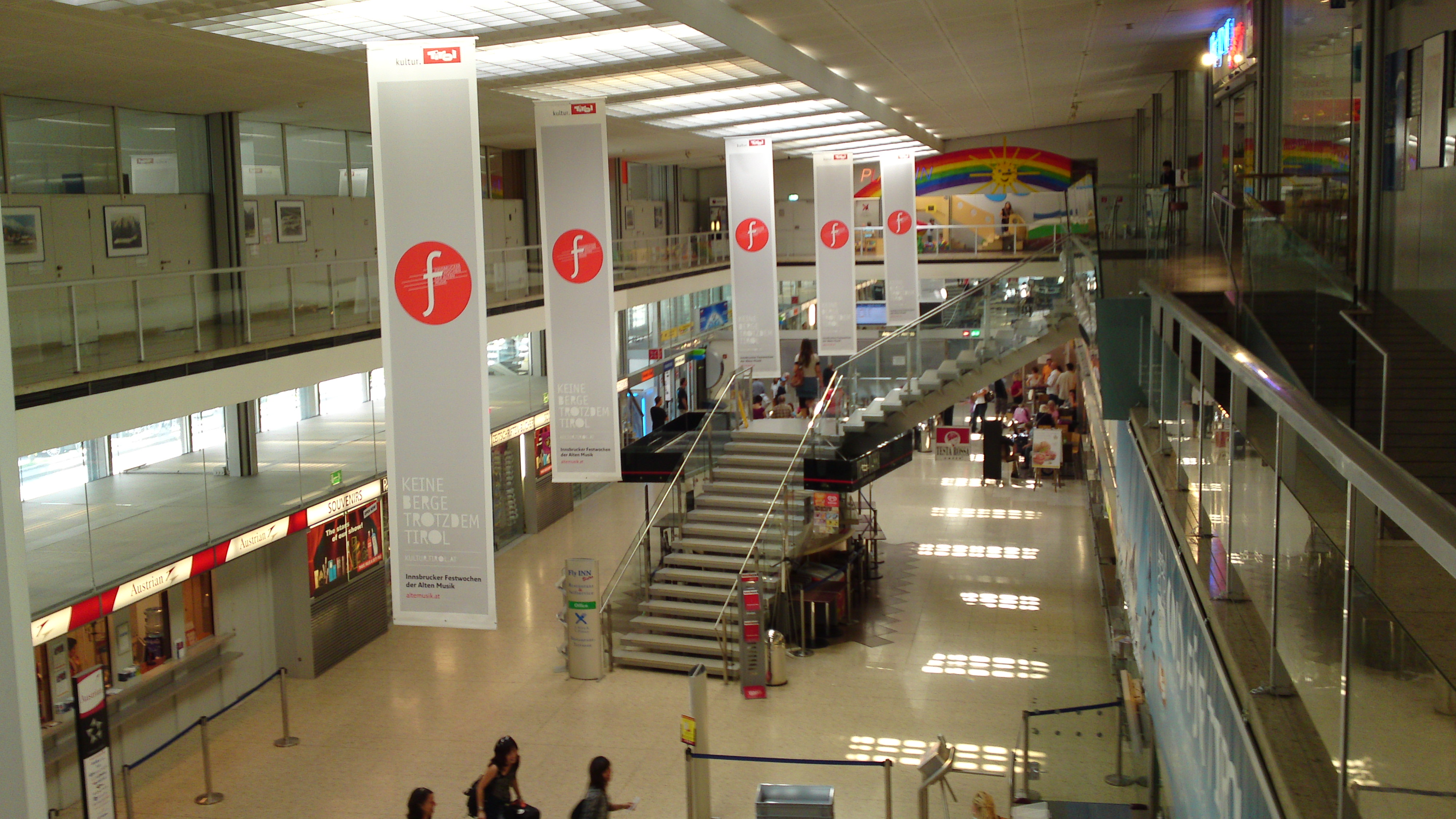 Innsbruck Flughafengebäude und Tower von der Straßenseite. Innsbruck, Tirol, Österreich.